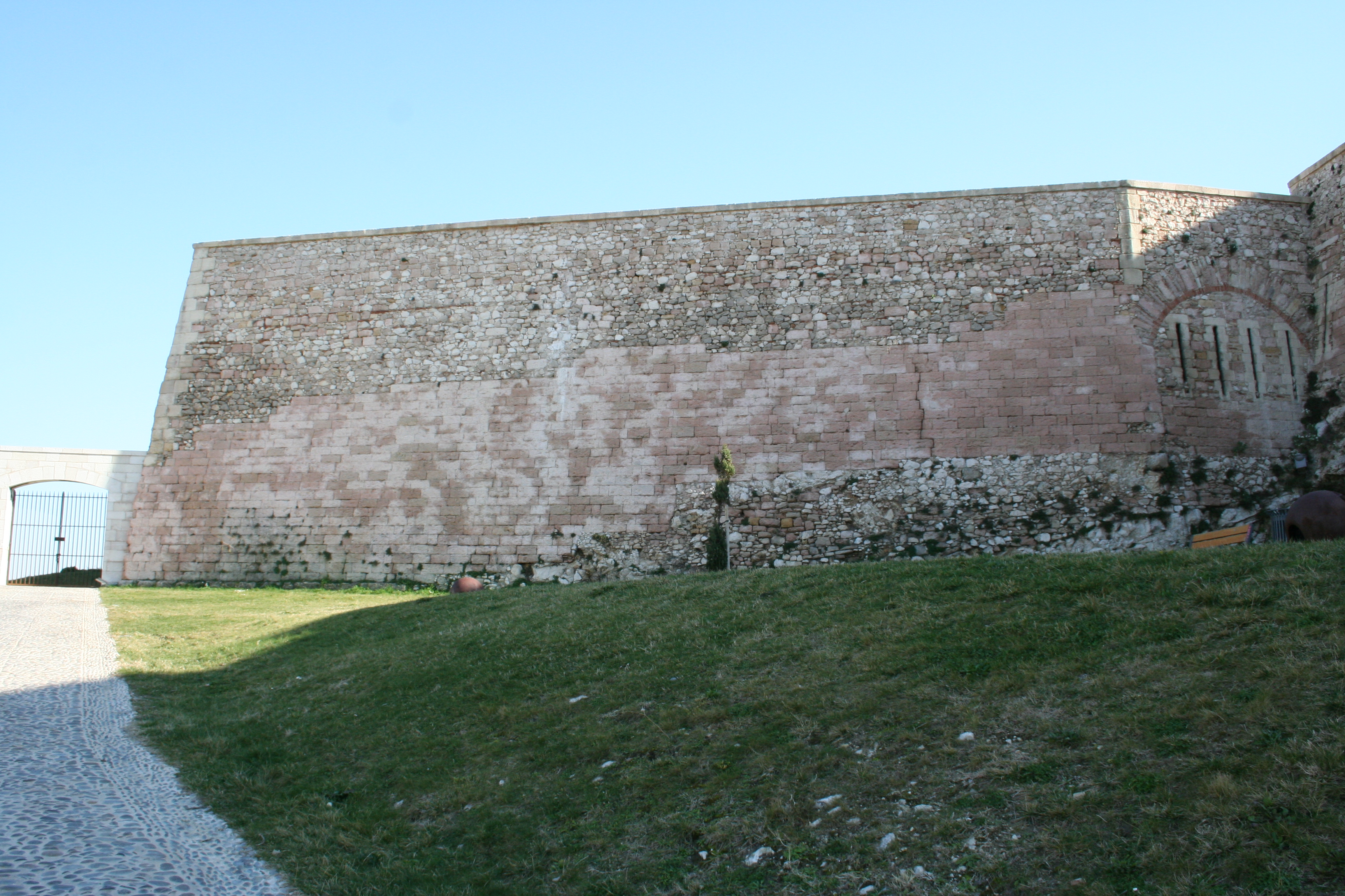 Marseille fort Saint-Nicolas, demi lune Villeroy, détail du parement montrant la réparation faite après les démolitions effectuées à la Révolution.